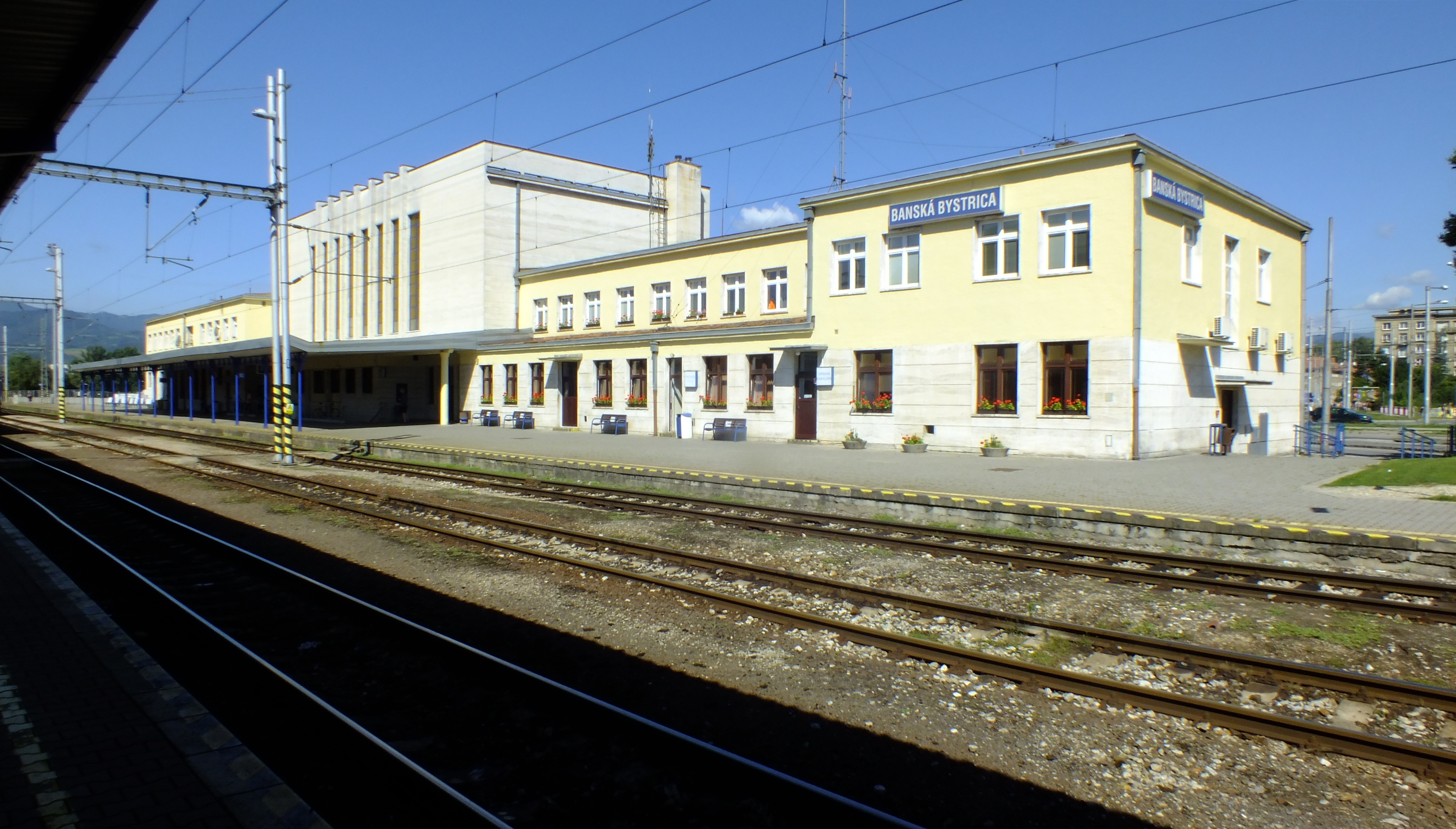 Staniční Budova v Banské Bystrici